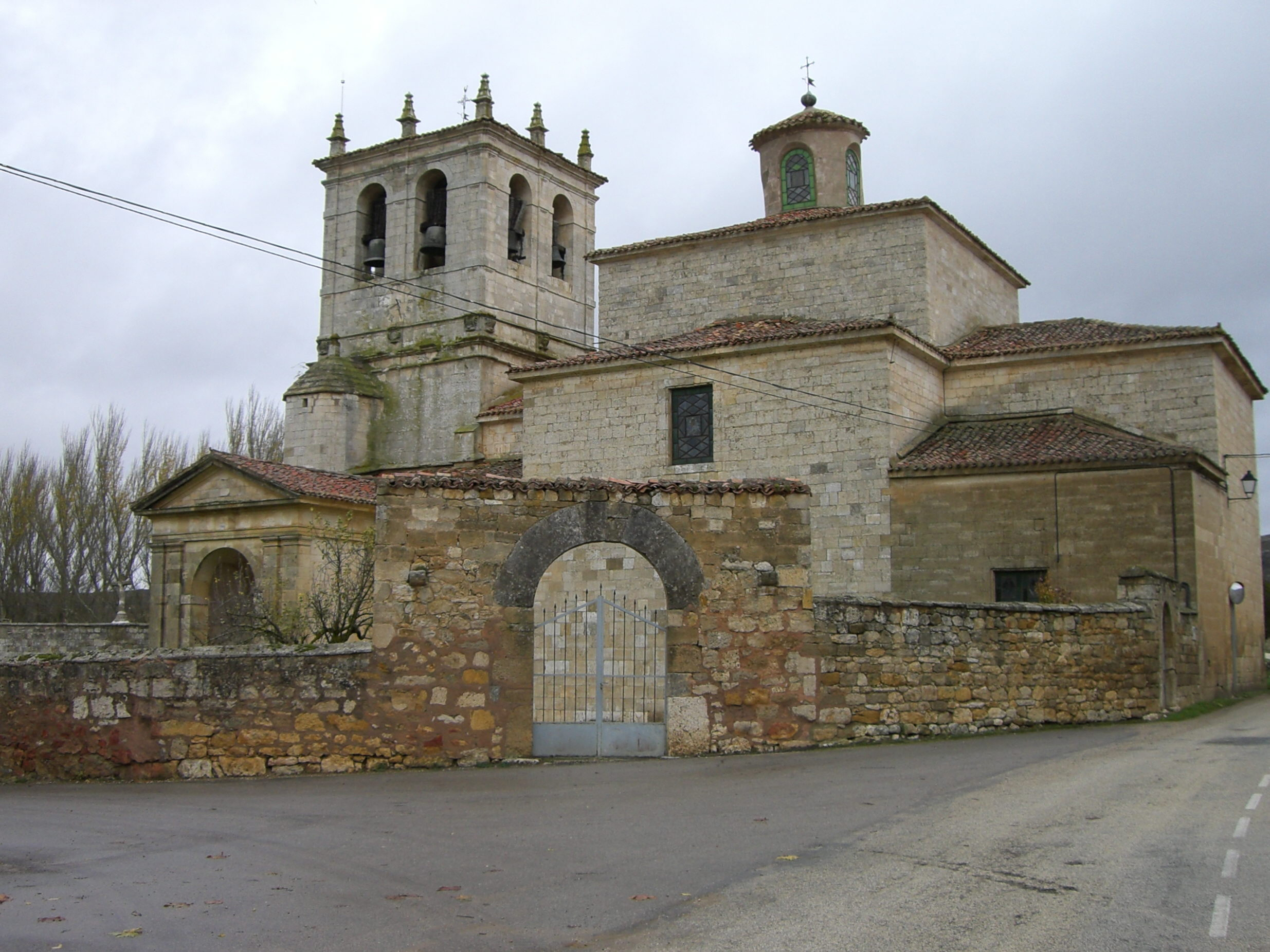 es la iglesia de huermeces